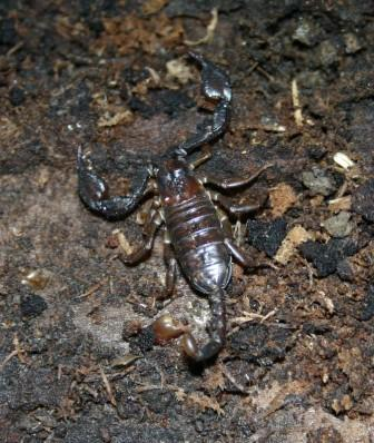 Monte Pizzuta (PA), Sicily